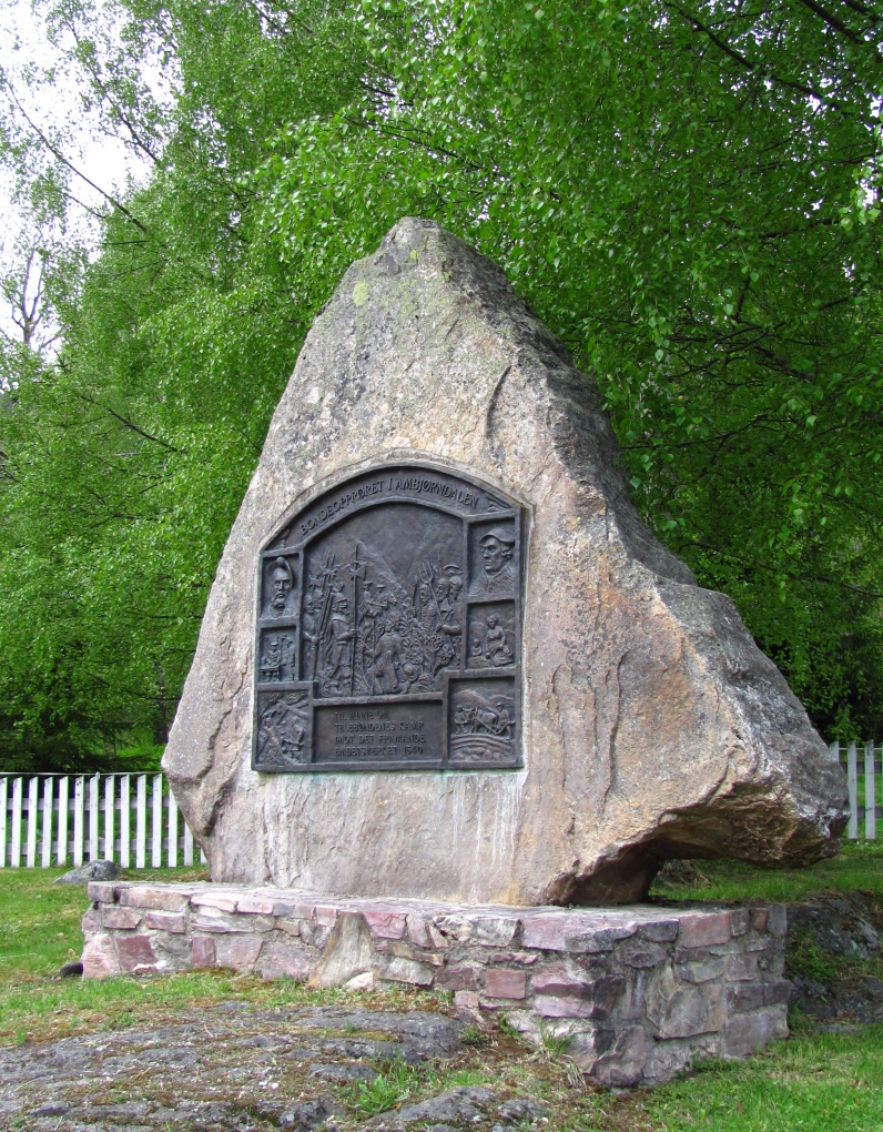 Minnesten for bondeopprøret 1540 reist ved Hjartdal kyrkje, Hjartdal kommune, Telemark